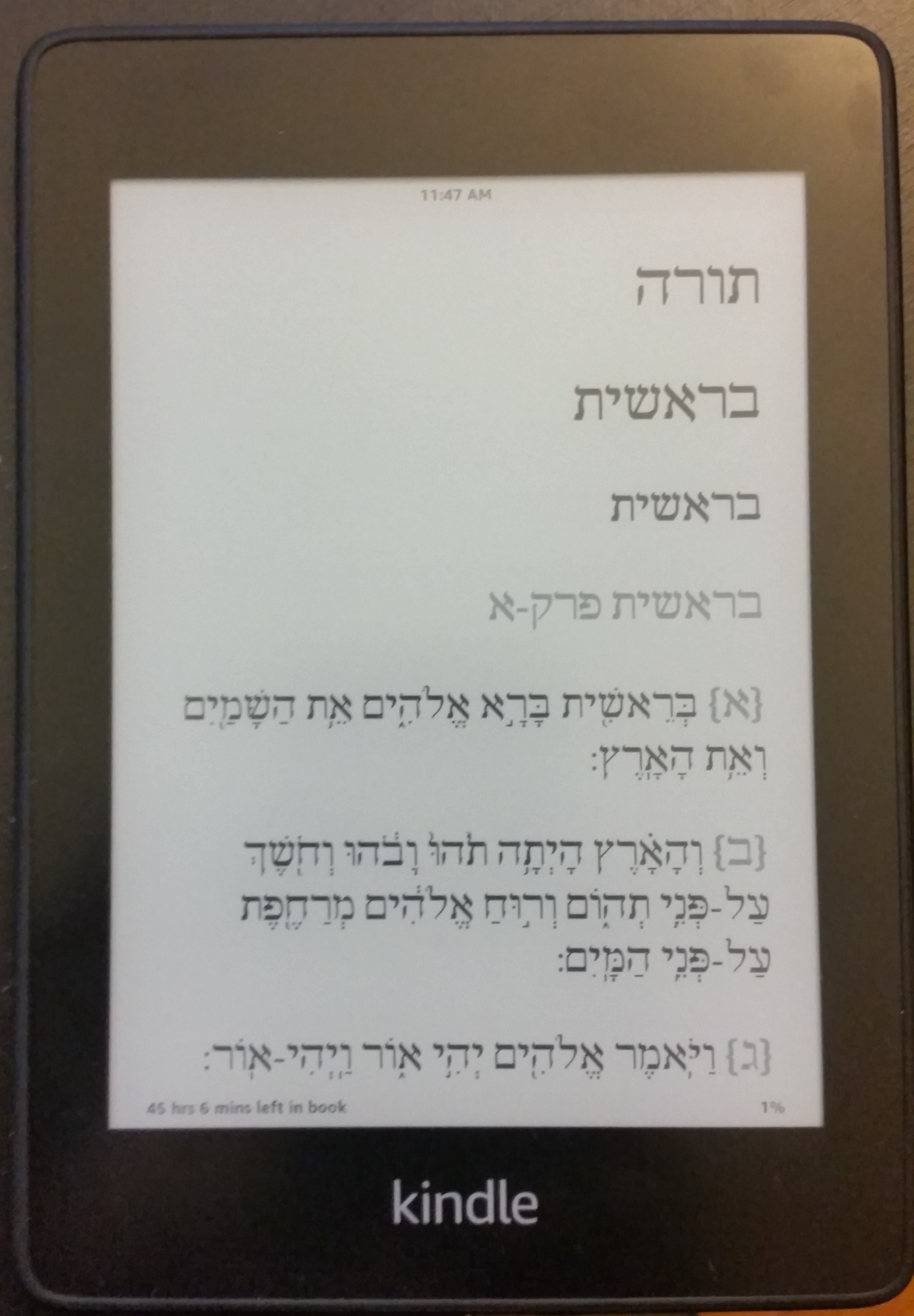 קינדל פייפרוויט מציג את תחילת ספר בראשית בעברית עם ניקוד וטעמים